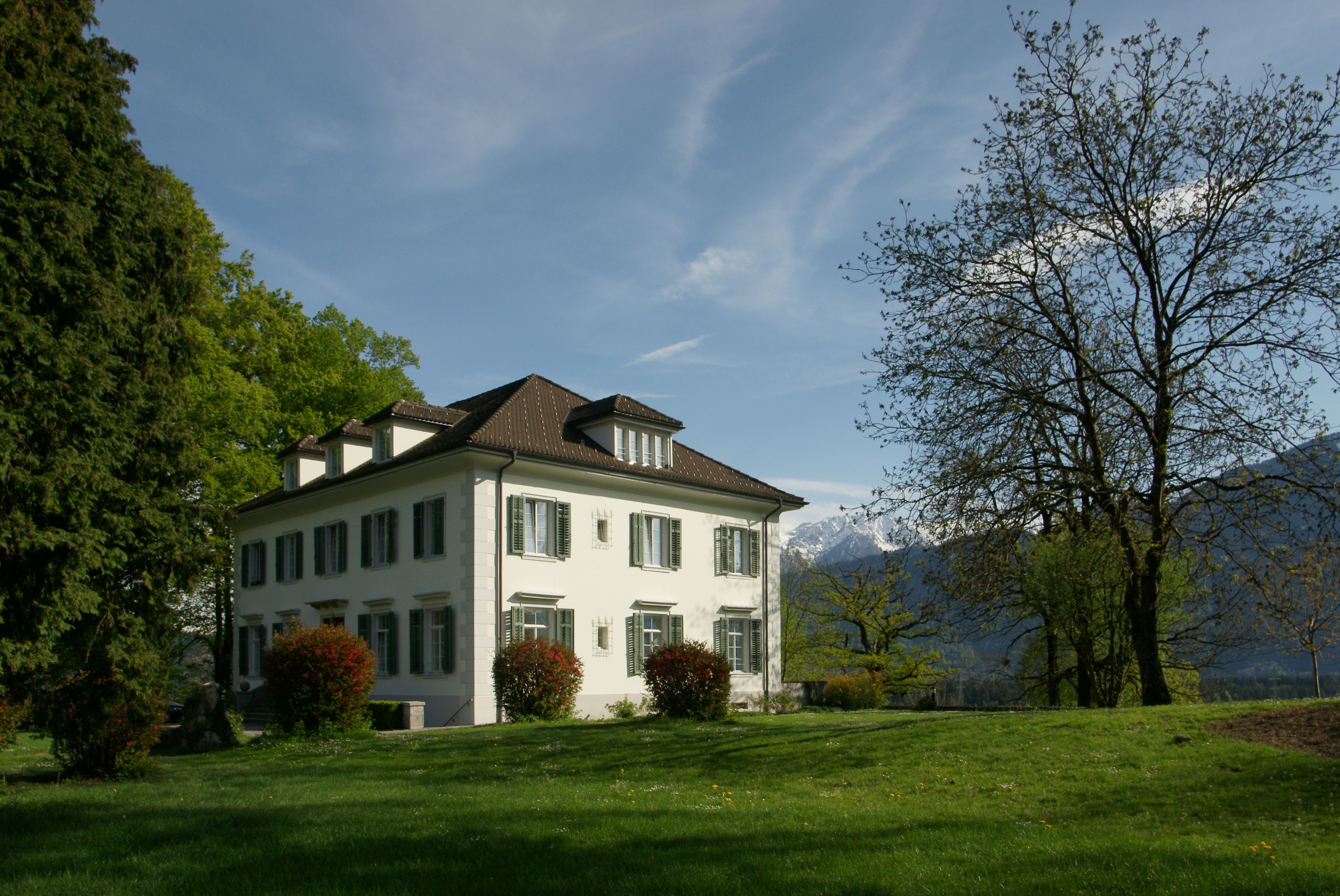 Flugelin Nr.3 in Thüringen, Vorarlberg. “Ansitz Falkenhorst” Geburtshaus von John Sholto Douglass 1838 sowie dessen Sohn George Norman Douglas 1868. Die Villa Falkenhorst wurde 1837 von John und seiner Frau Jane Douglass erbaut. Einfacher, englischer Landhausstil in Anlehnung an die italienische Renaissance